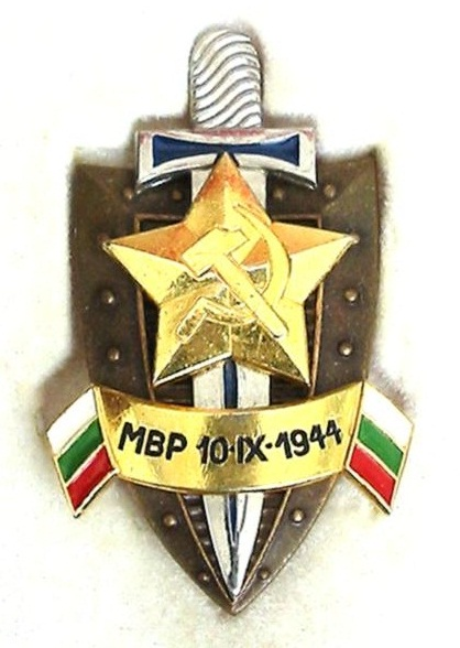 Почетен знак на МВР и ДС